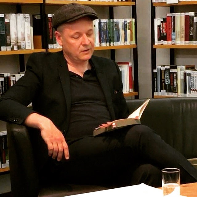 Autorenlesung